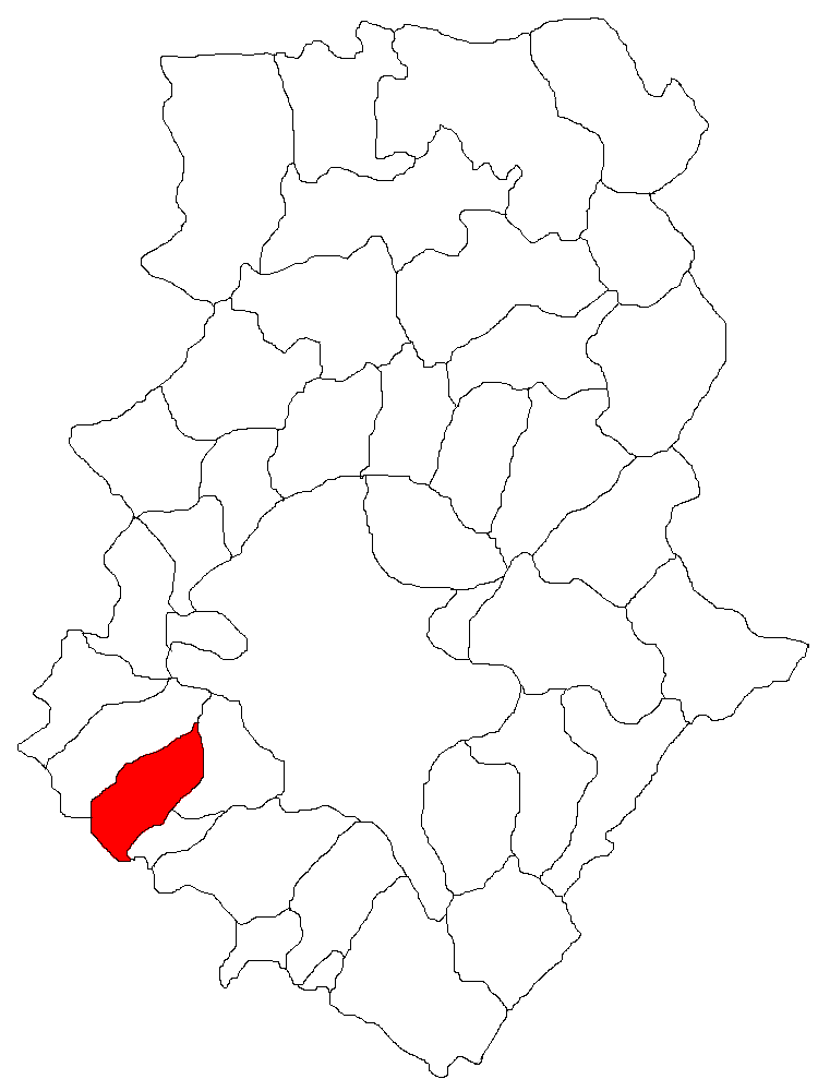 Categorie:Hărţi ale judeţului Ilfov